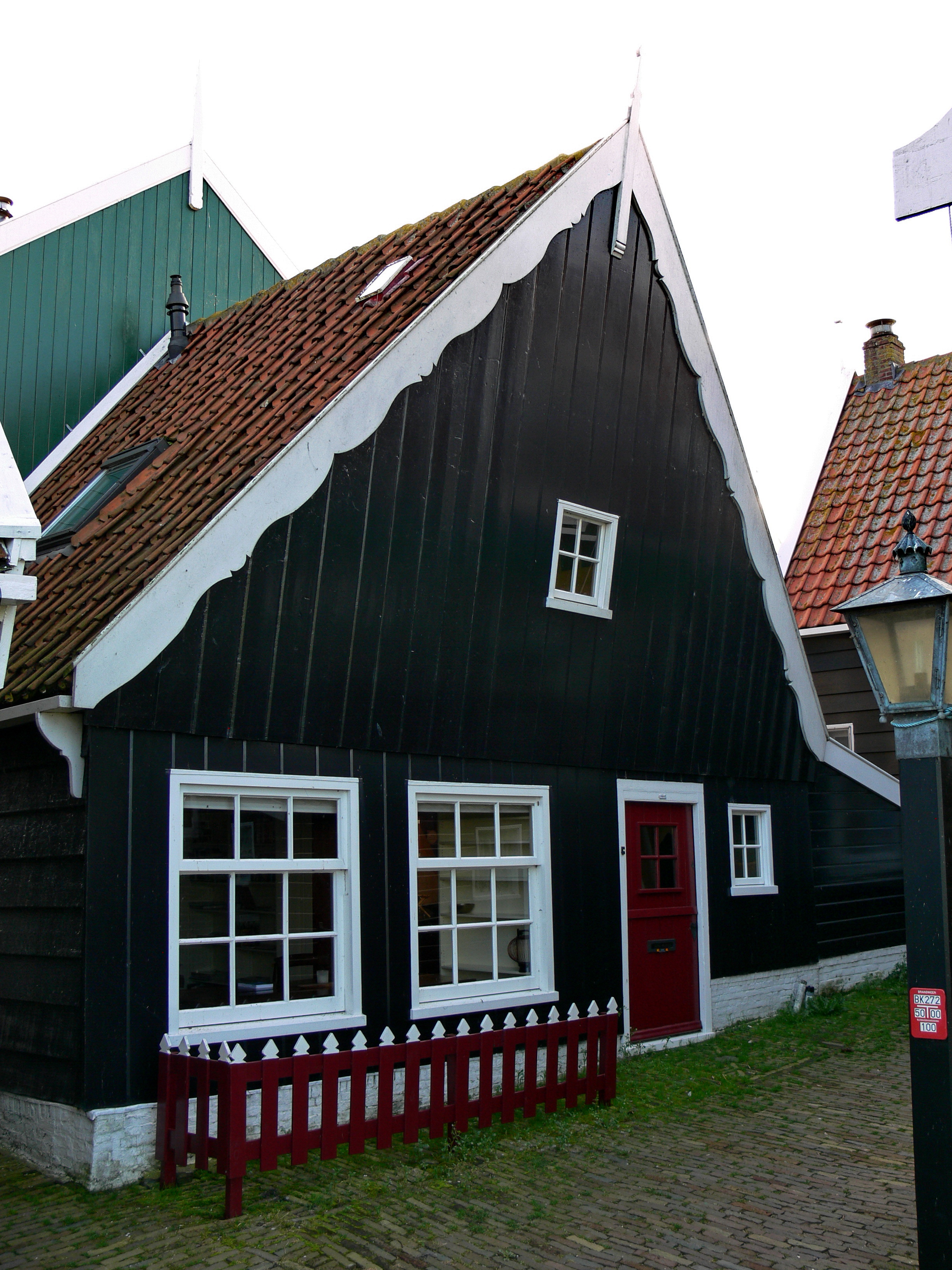 Perceelsgedeelte van een houten huis. Topgevel met uitgeschulpte windveren en daklijst op consoles. Vormt een geheel met het buurnummer 11.